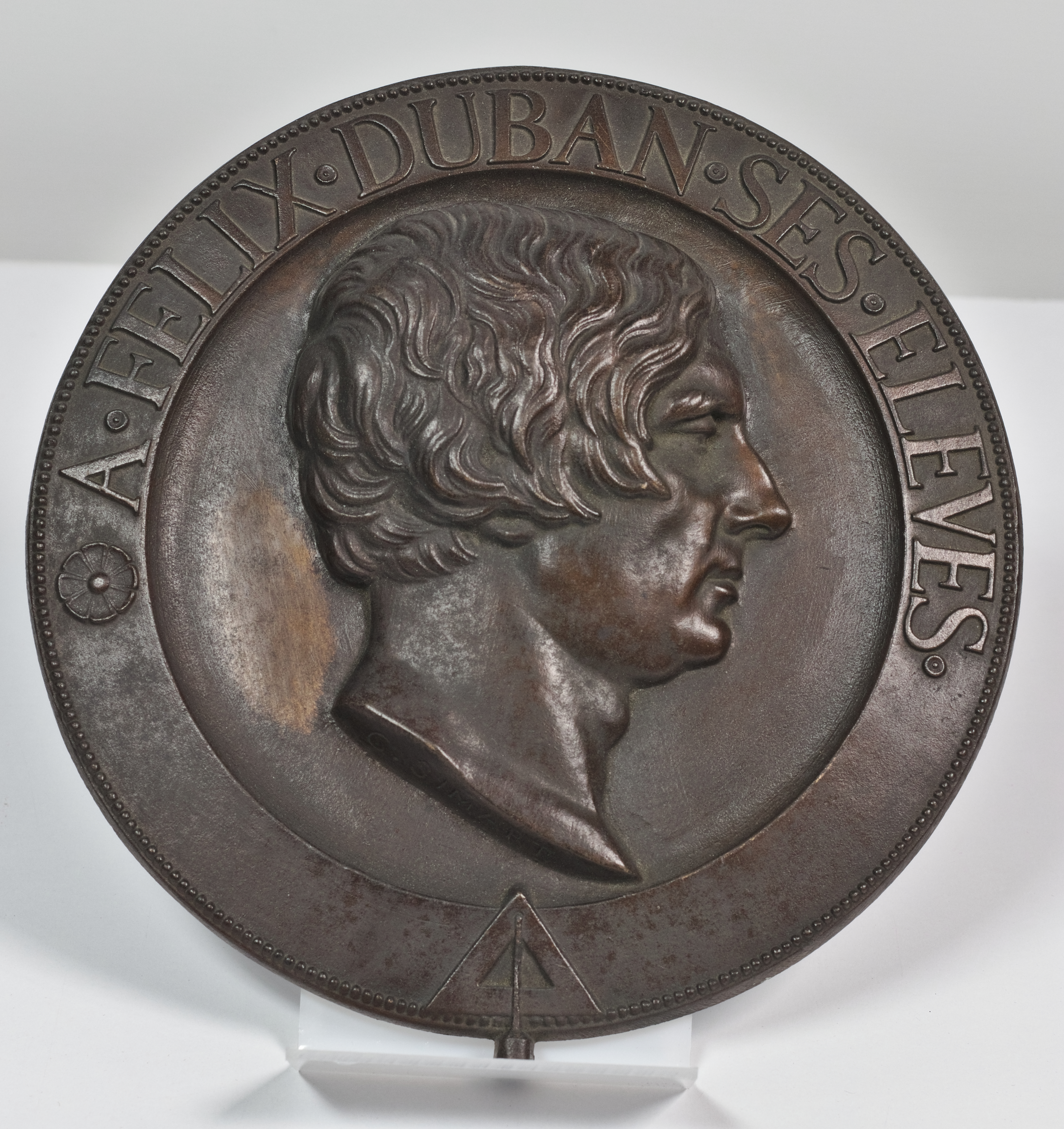 Médaille de Félix Duban avec l'inscription A FELIX DUBAN SES ELEVES. Fond Léon Losseau, Maison Léon Losseau, Mons.